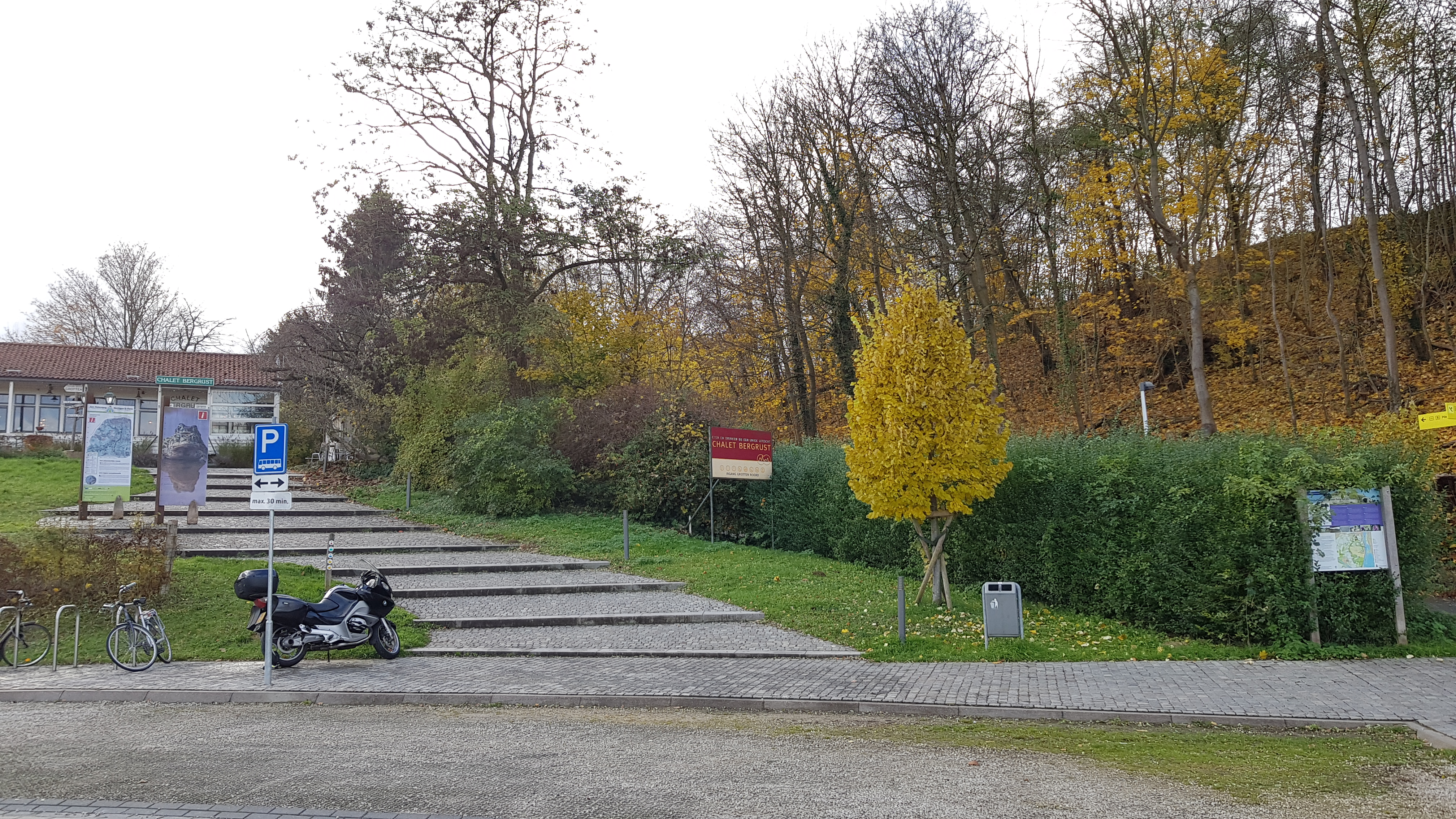 locatie van het Predikherengat in de 21e eeuw, Sint-Pietersberg, Maastricht, Nederland